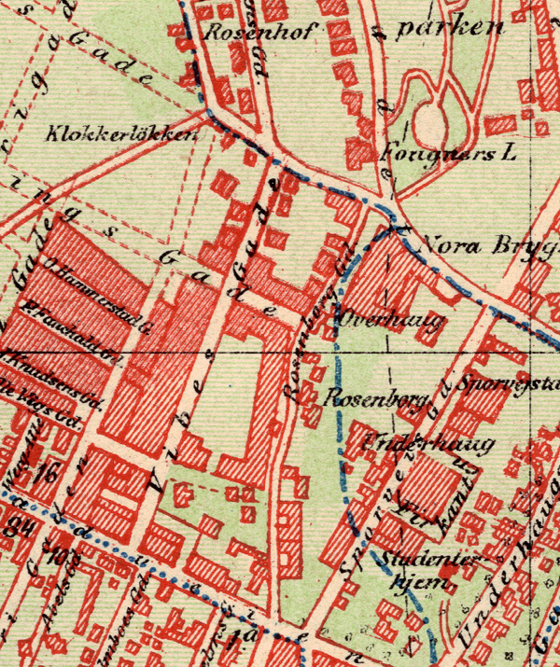 Rosenborg, Oslo.